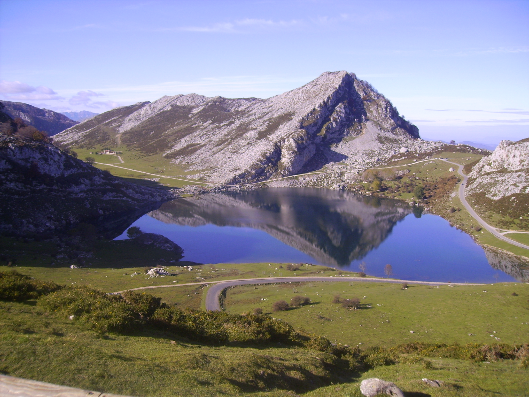 Lago Enol, en Covadonga, Asturias, España.